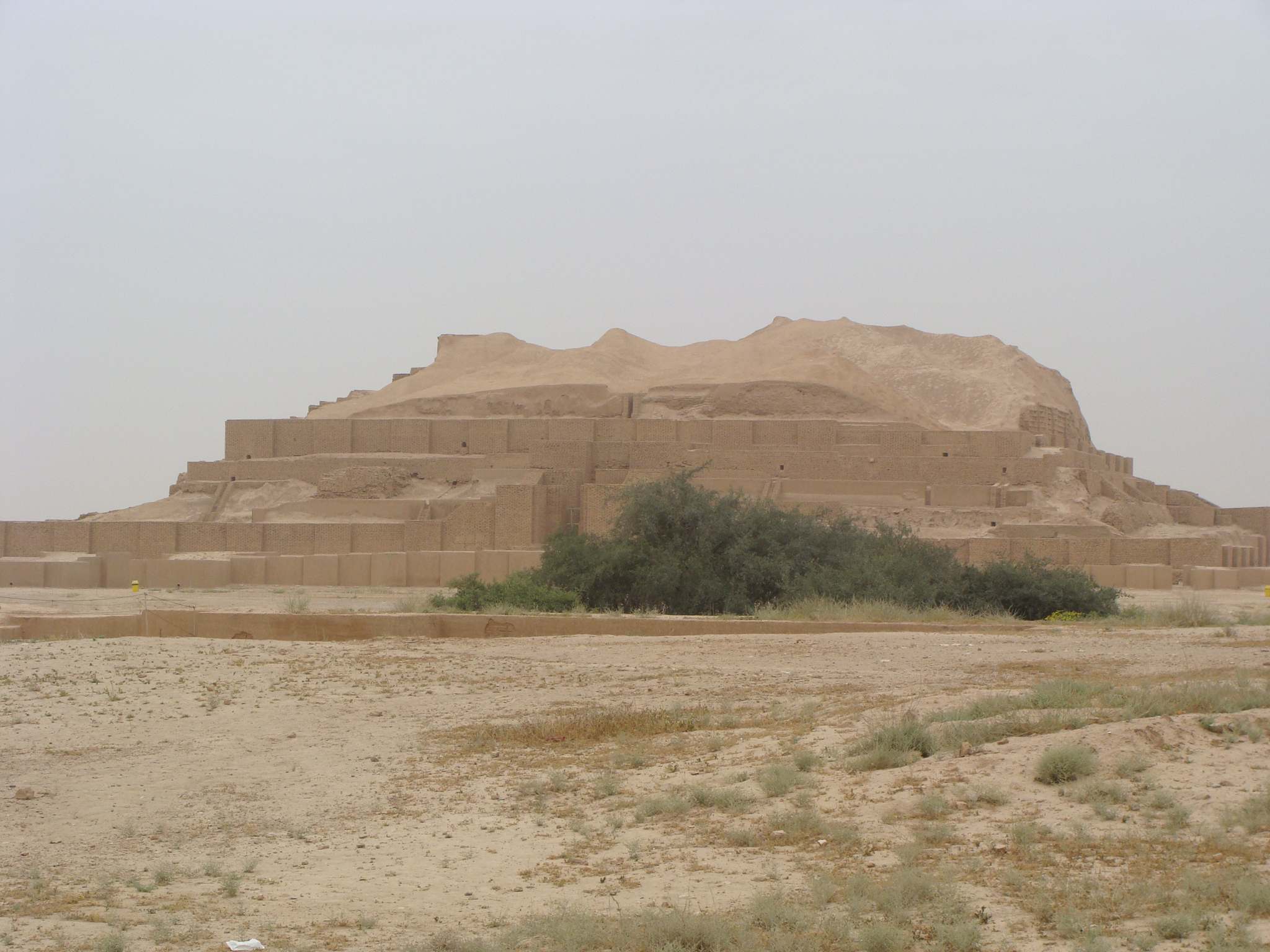 Зиккурат (Чегазамбил). 45 км от Шуша (Хузестан, Иран). 1300 г до н.э. Эламский период.